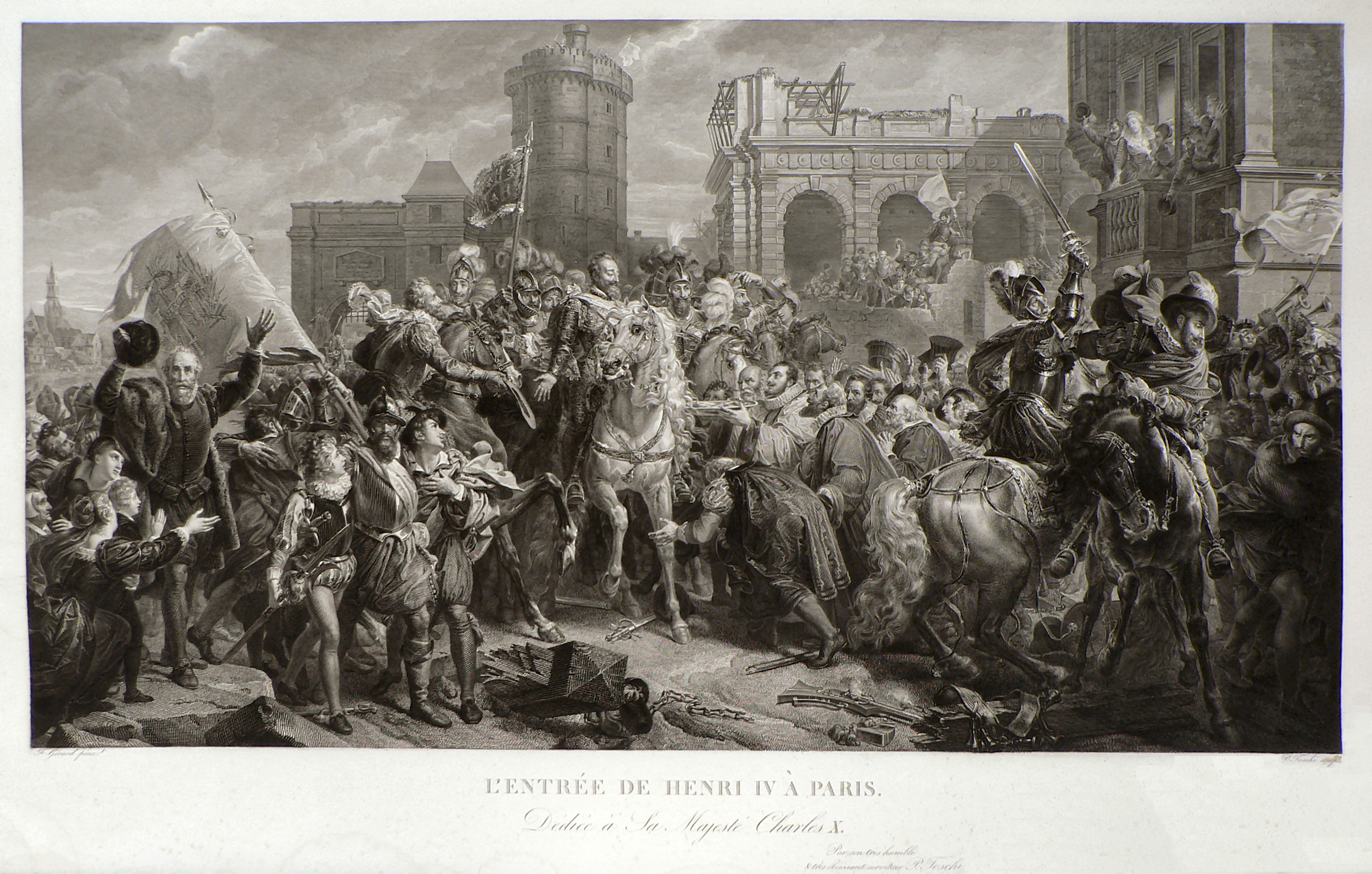 L'entrée d'Henri IV à Paris, gravure (920 x 490)